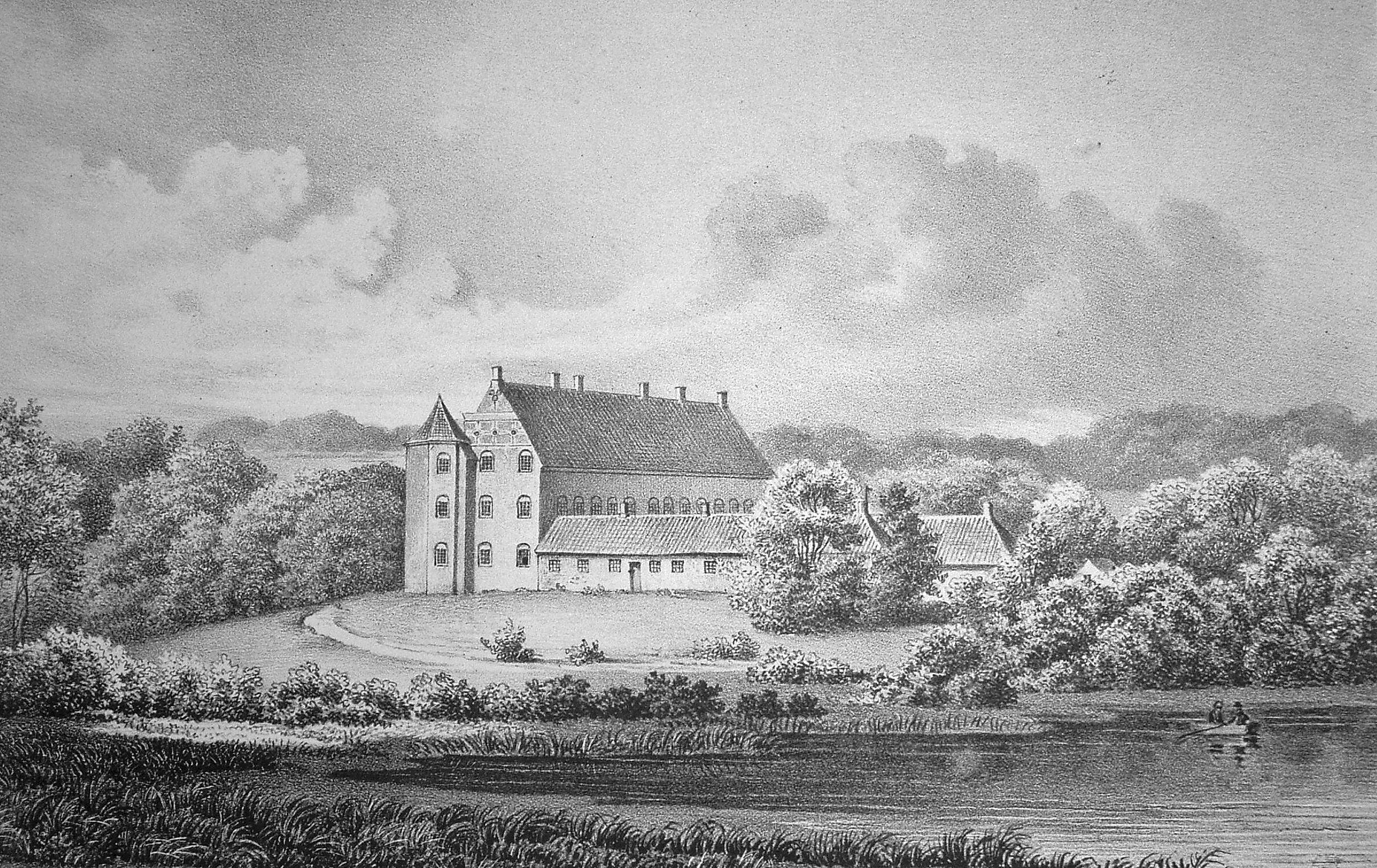 Rugård er en hovedgård i Rosmus Sogn i det tidligere Djurs Sønder Herred, Randers Amt, nu Syddjurs Kommune Region Midtjylland.